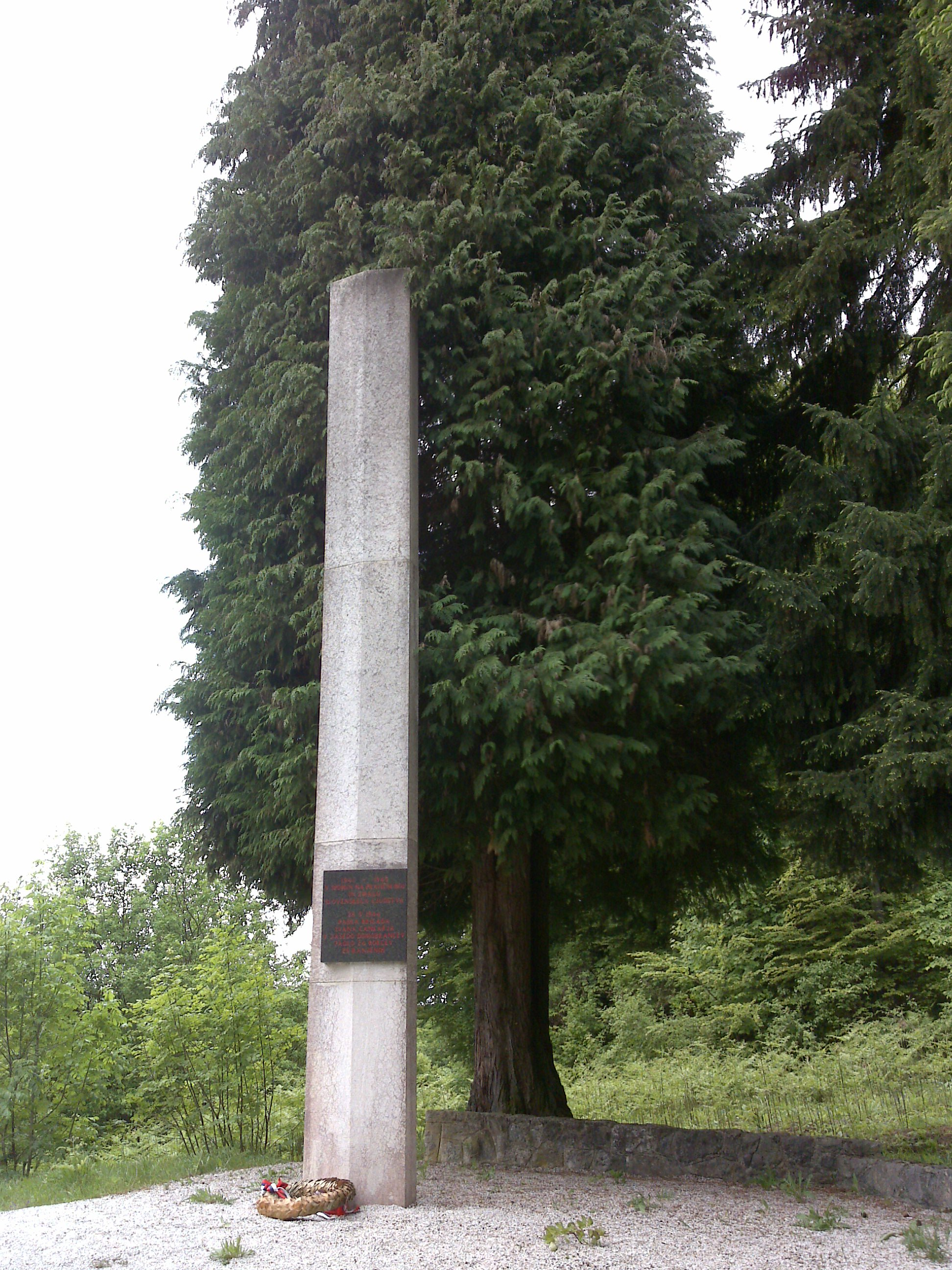 Javorski Pil - spomenik NOB